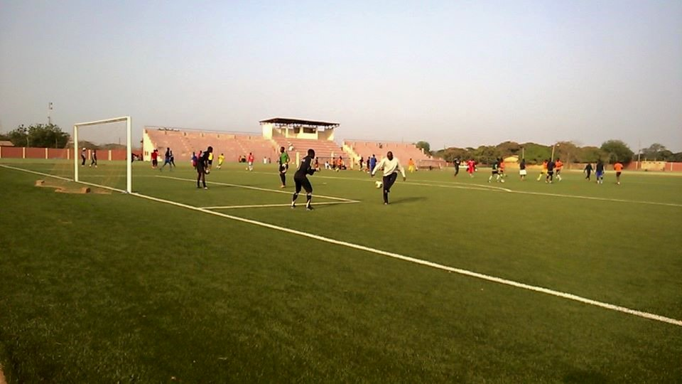 Stade municipal en gazon synthétique de la ville de Parakou